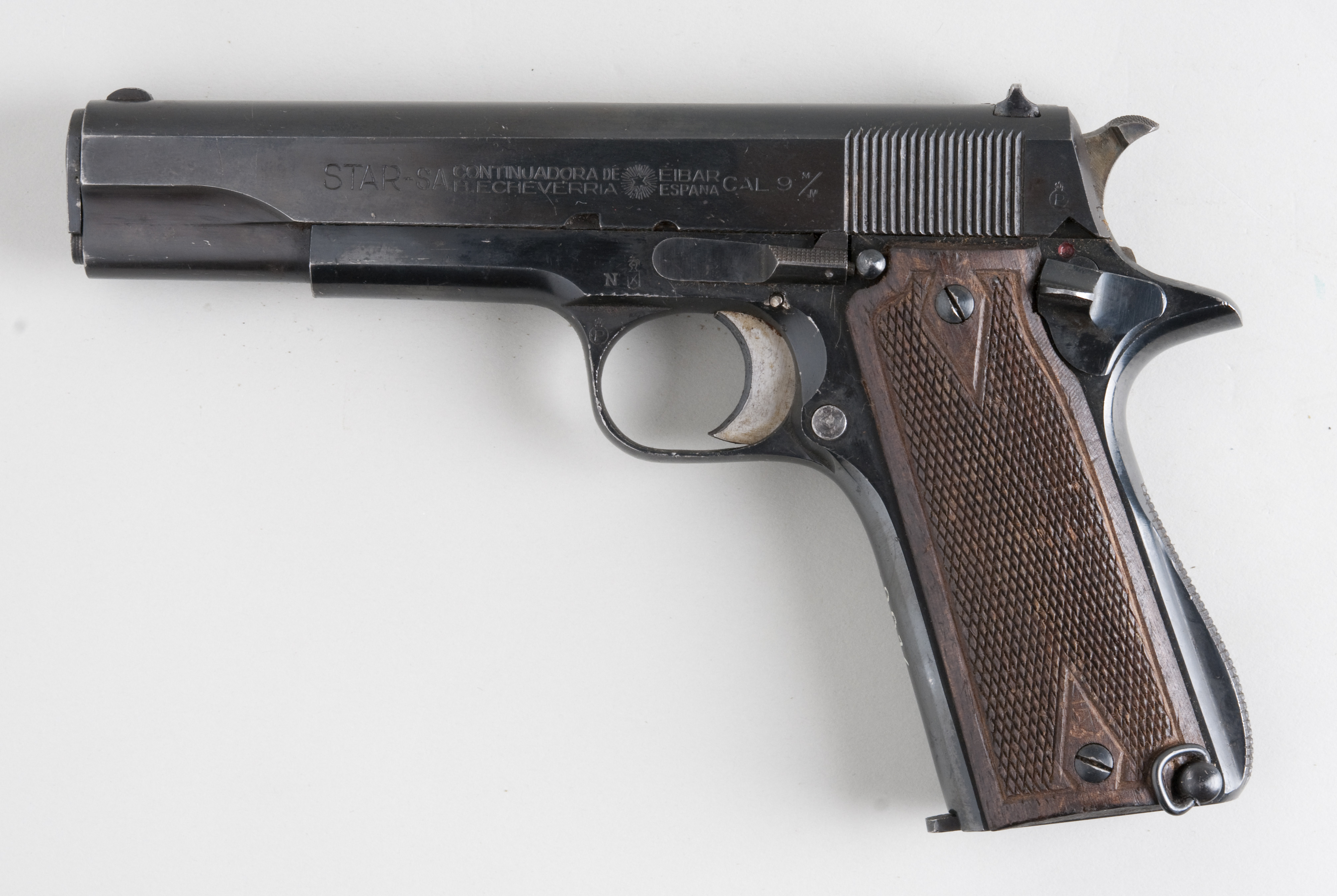 Star 9 mm From flickr user handvapensamlingen - Pistols used in Norway.